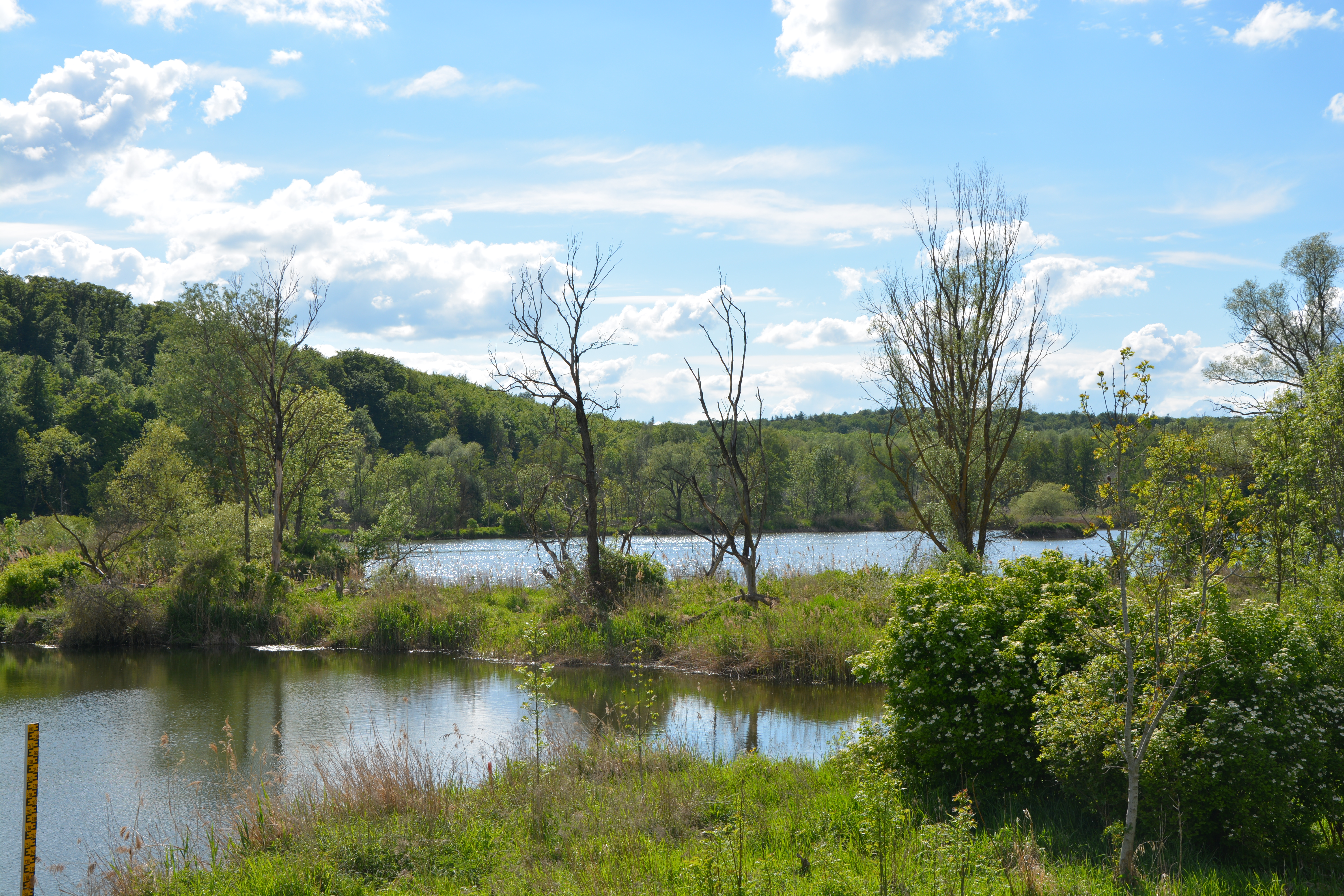 (LSG:BY-LSG-00432.01)_Schutz des Donautales westlich von Neuburg im Gebiet der Stadt Neuburg sowie der Märkte Burgheim und Rennertshofen und der Gemeinde Oberhausen, Landkreis Neuburg-Schrobenhausen aufgenommen südlich des Antoniberges, Koordinaten 48° 44′ 1.35″ N, 11° 4′ 50.15″ E